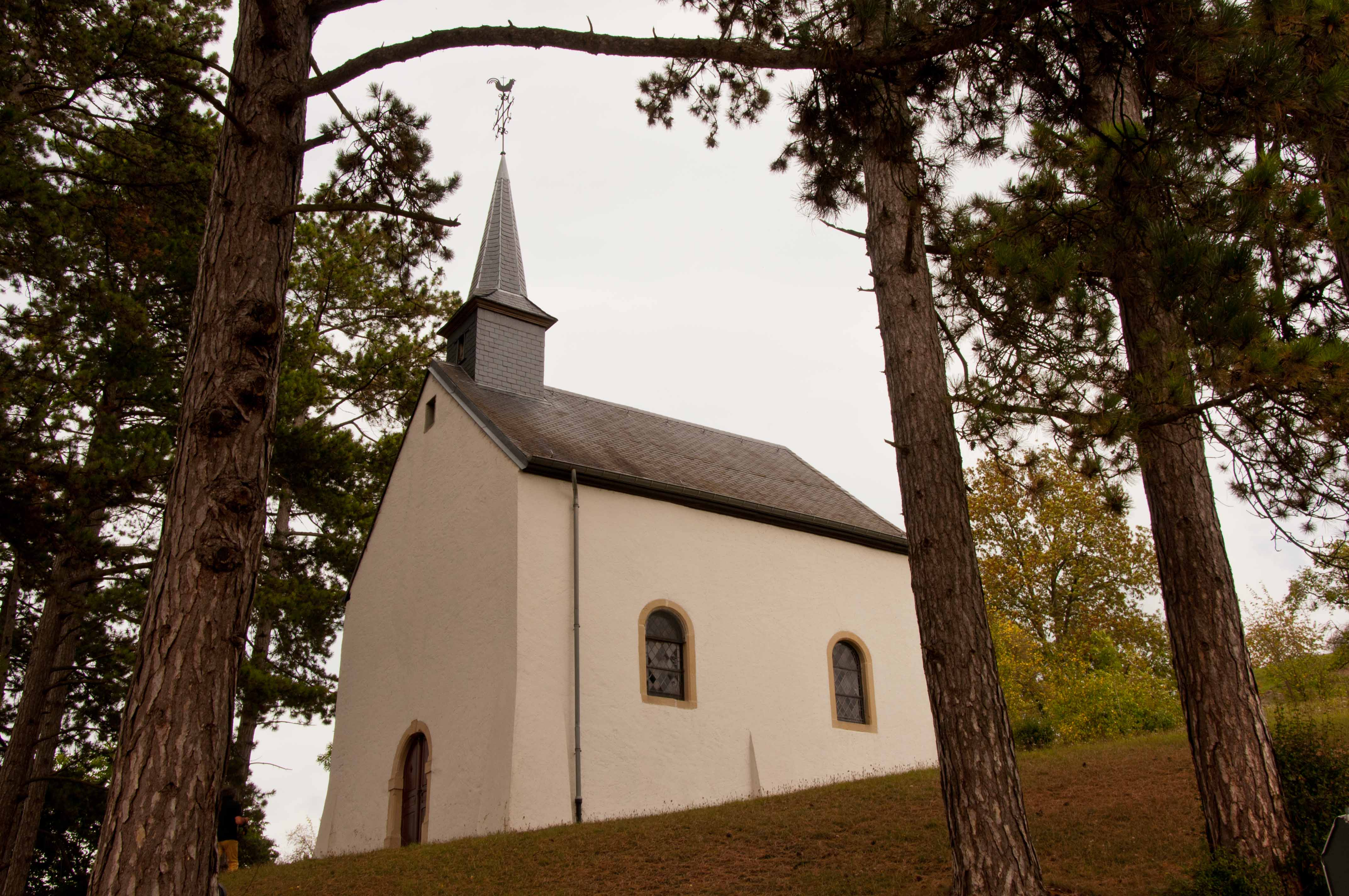 Oberglabach - Kapelle